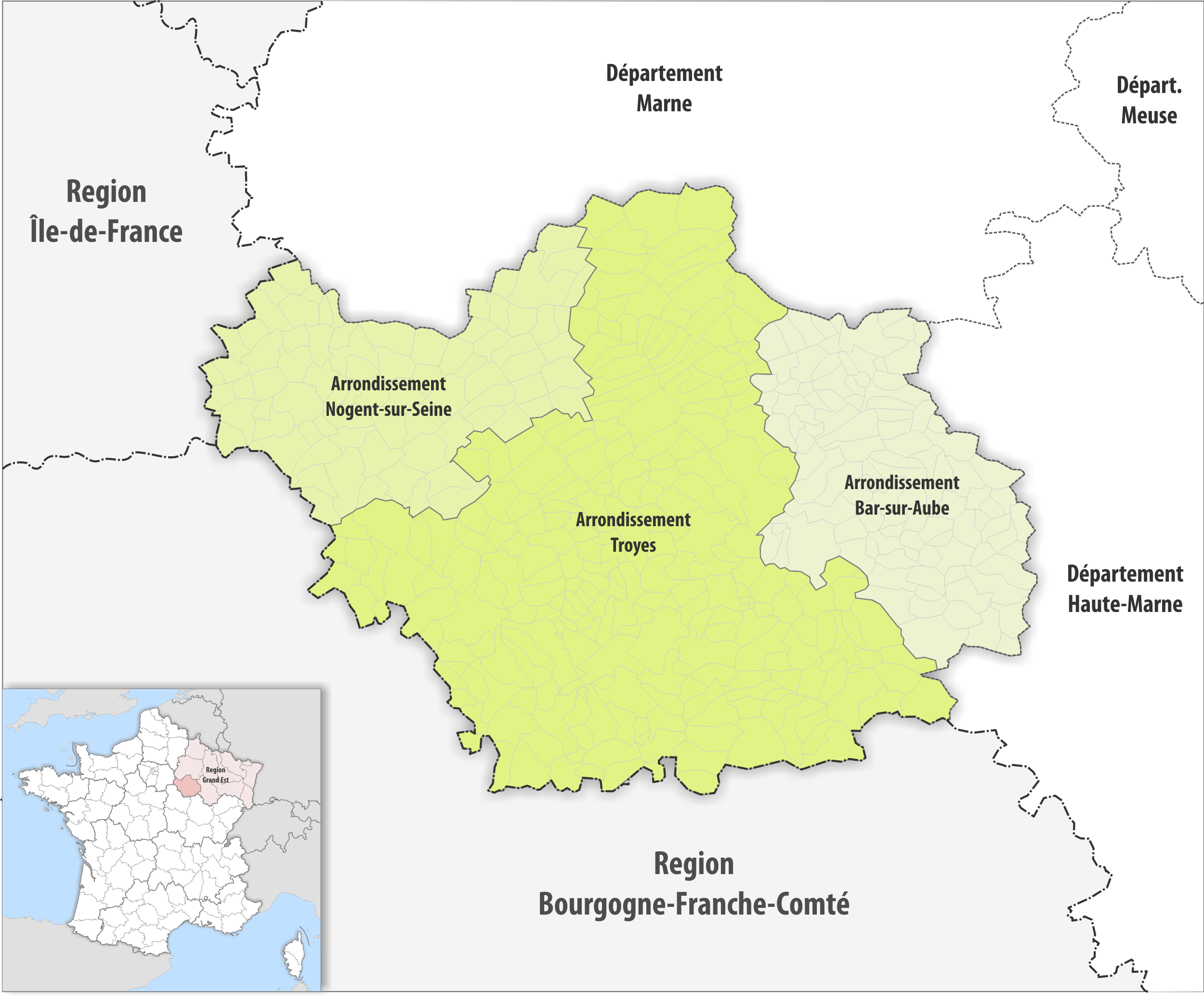 Gemeinden und Arrondissemente im Departement Aube